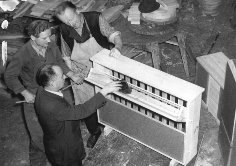 Magdeburg, Möbeltischlerei, Schuhschrank Zentralbild Biscan 20.12.1957 Die Massenbedarfsgüterproduktion kommt wieder in Gang. Im Schwermaschinenbau "Gerogij Dimitroff" in Magdeburg ist seit dem 33. Plenum die Erzeugung von Waren des täglciehn Bedarfs wieder angelaufen. Zur Zeit werden bereits Äxte, Beile, Ambosse und Kleinmöbel hergestellt. In den nächsten Minuten kommen noch ein freiflammiger Gasofen mit Backofen und Grillröhre sowie Motorradkabinen hinzu. UBz: In der Modelltischlerei werden die Kleinmöbel gebaut, vorläufig Schuhkästen, Wäscheschlucker, Fußbänke usw. Erin Weging (vorn links) im Gespräch mit den Tischlern Richard Uhlmann (mit Schürze) und Erich Nielmann, die einen Schuhkasten gebaut haben.